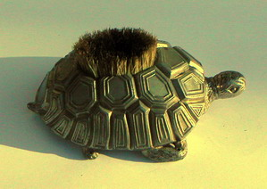 Essuie-plume décoratif - fin XIX° siècle